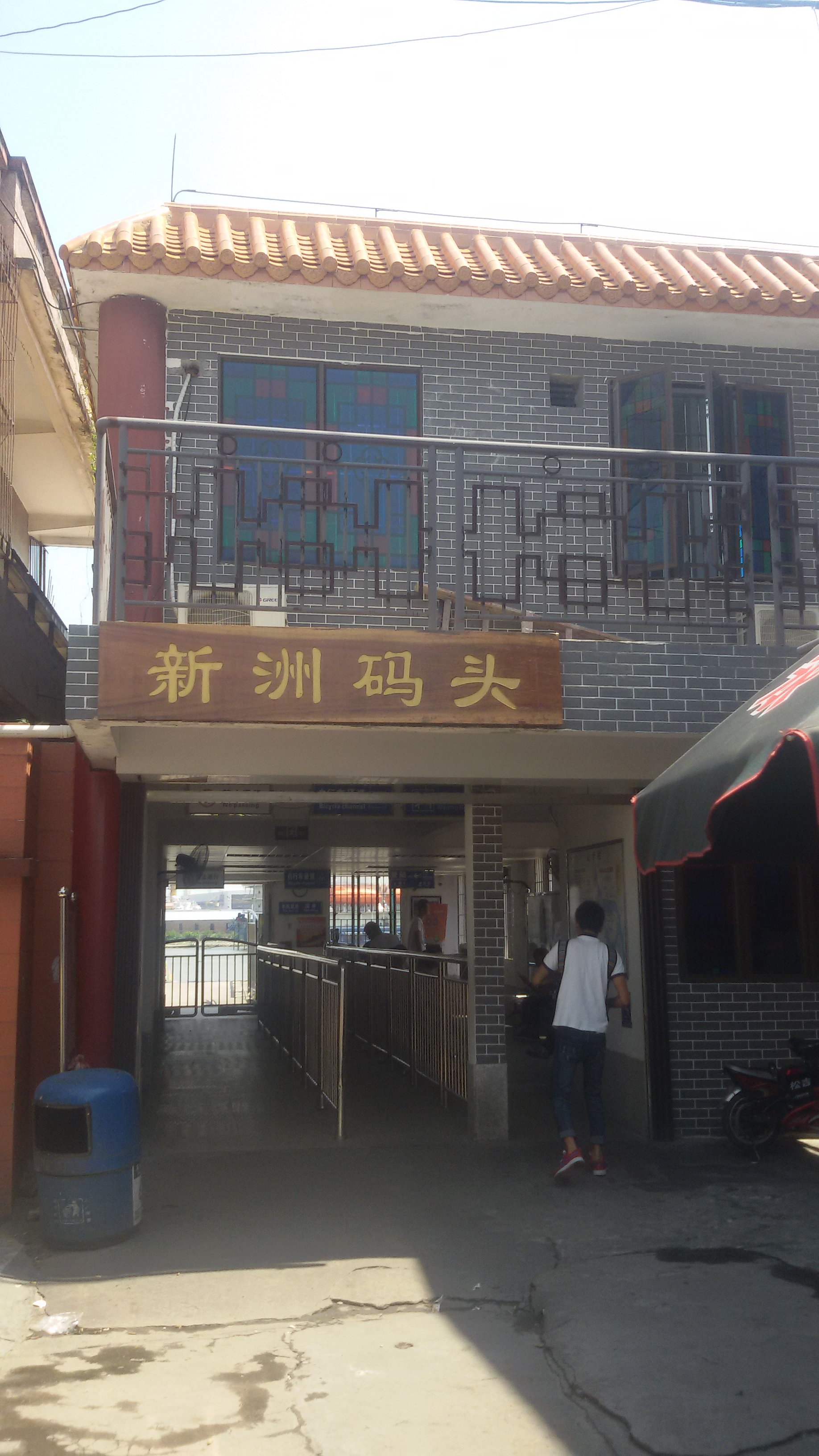 粵語: 新洲碼頭